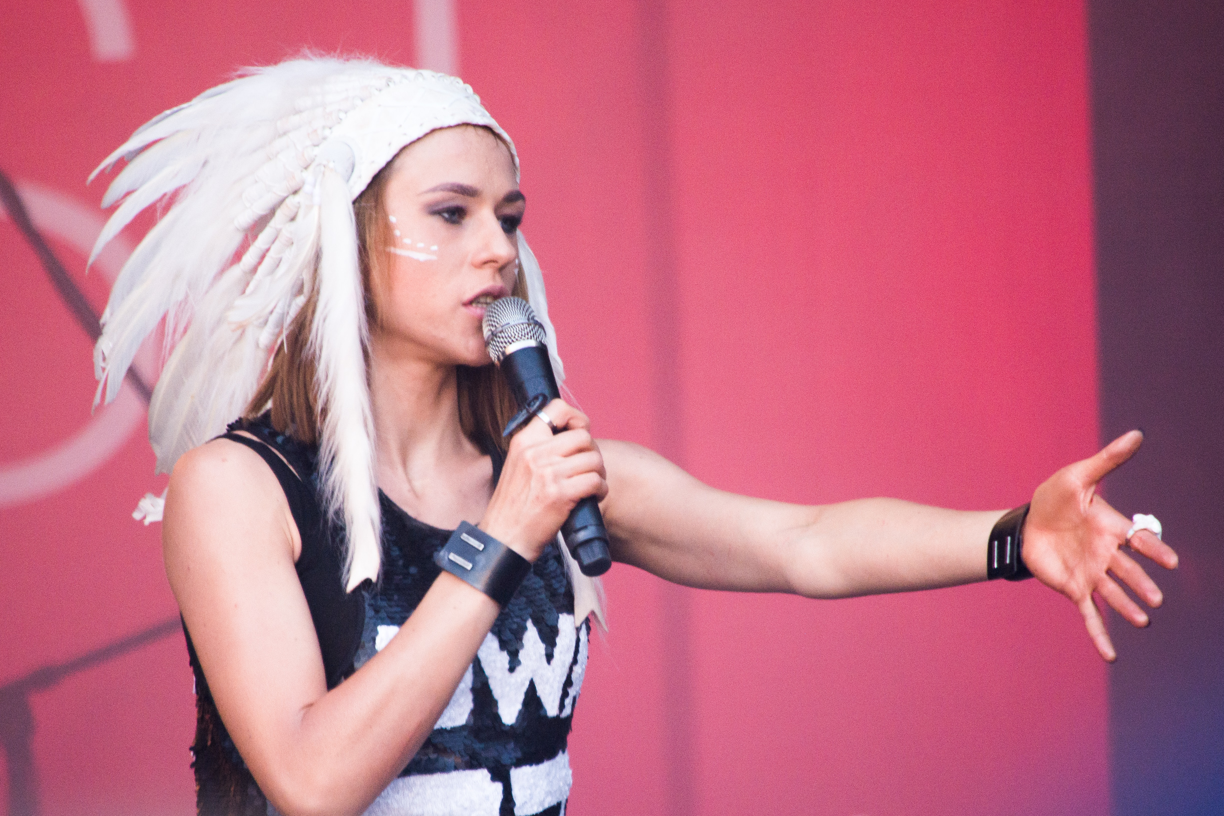 Группа IOWA на LENOVO VIBE Fest 2015 в Санкт-Петебурге